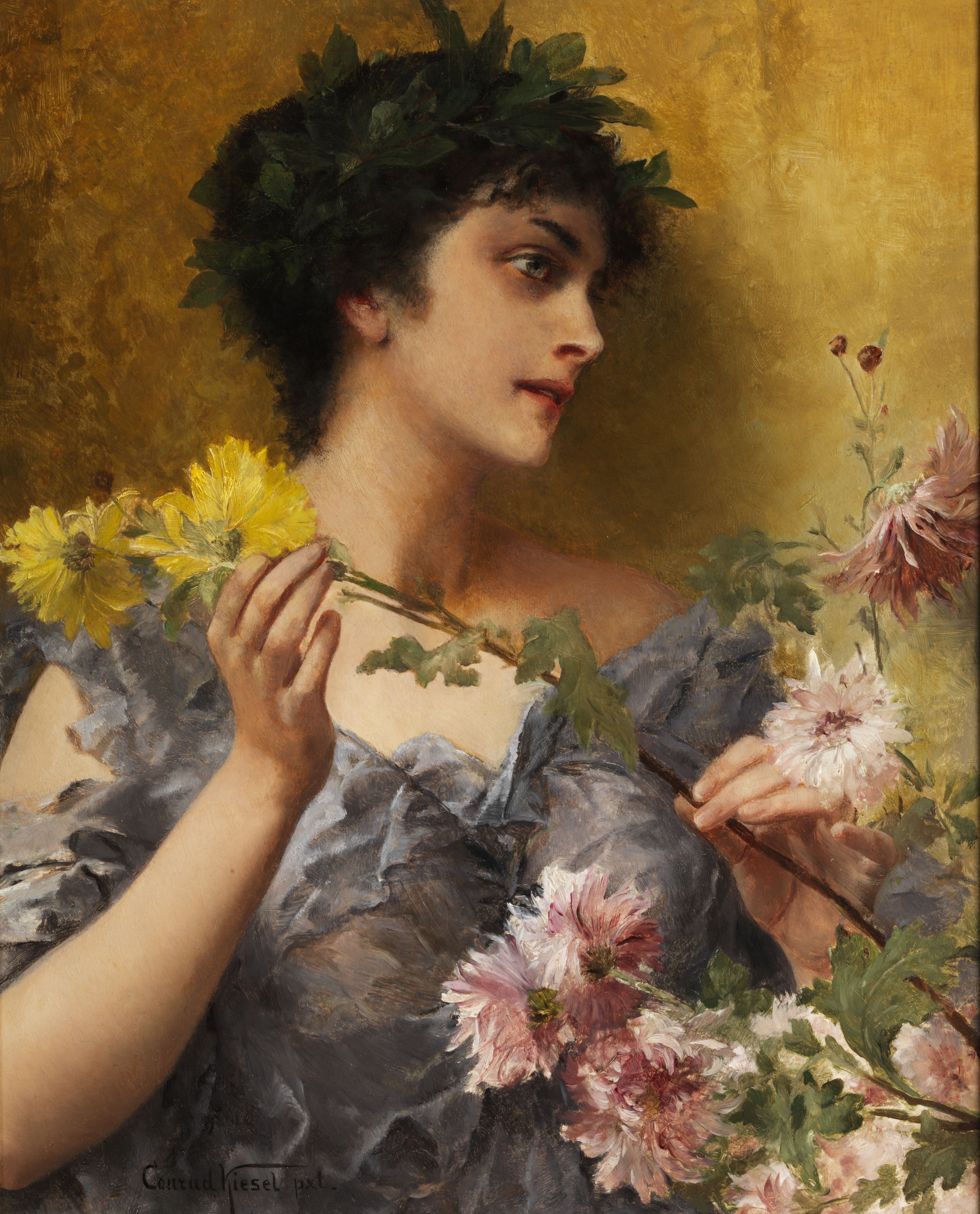 Tribut an die Blumen.